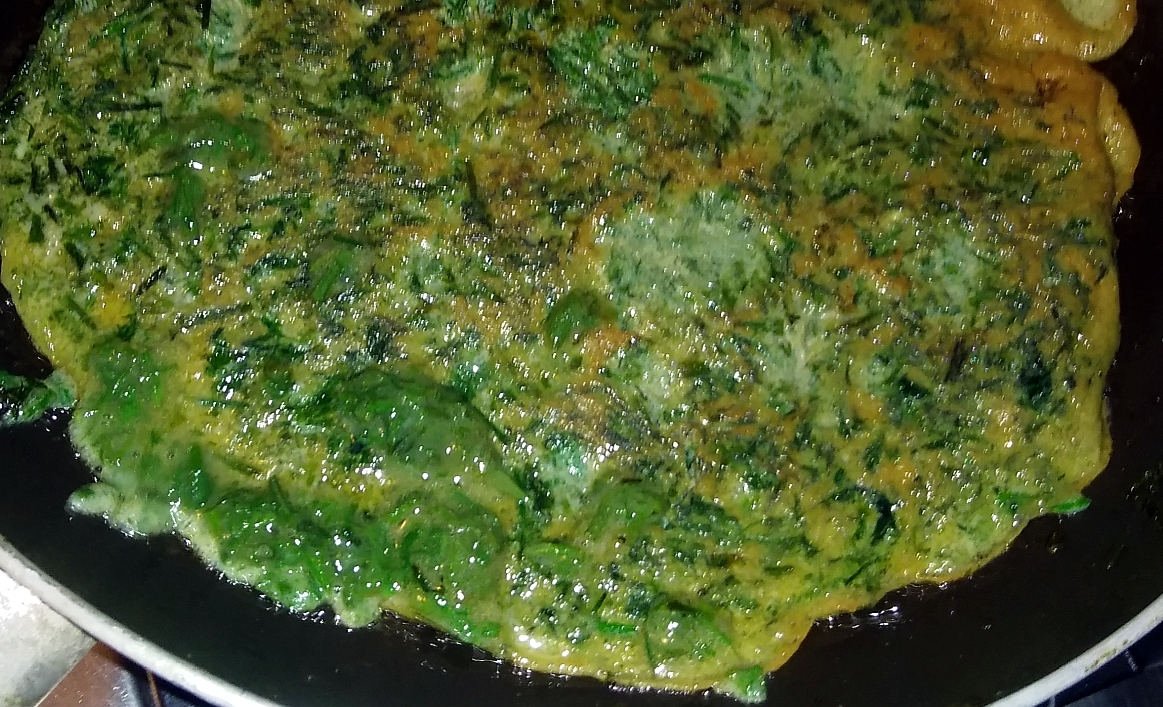 Frittura finale